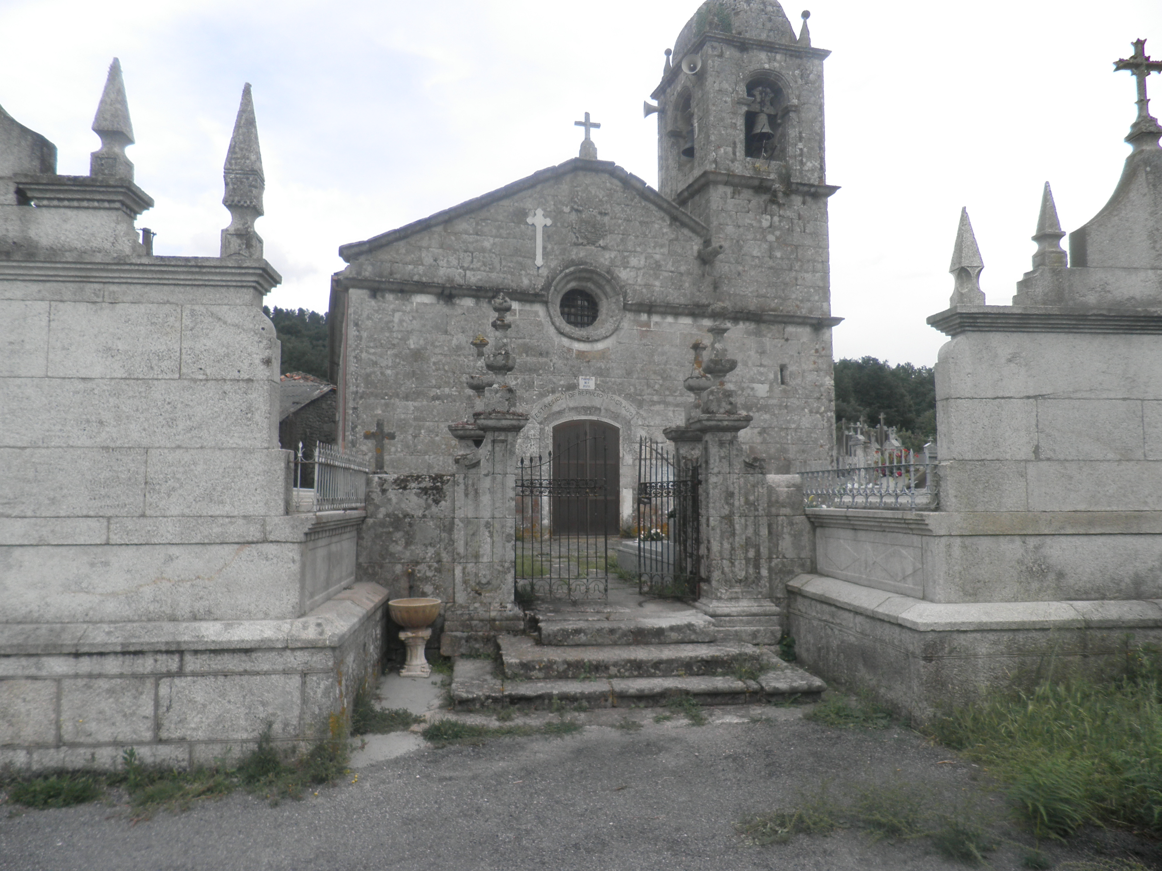 IGLESIA TABOADELA